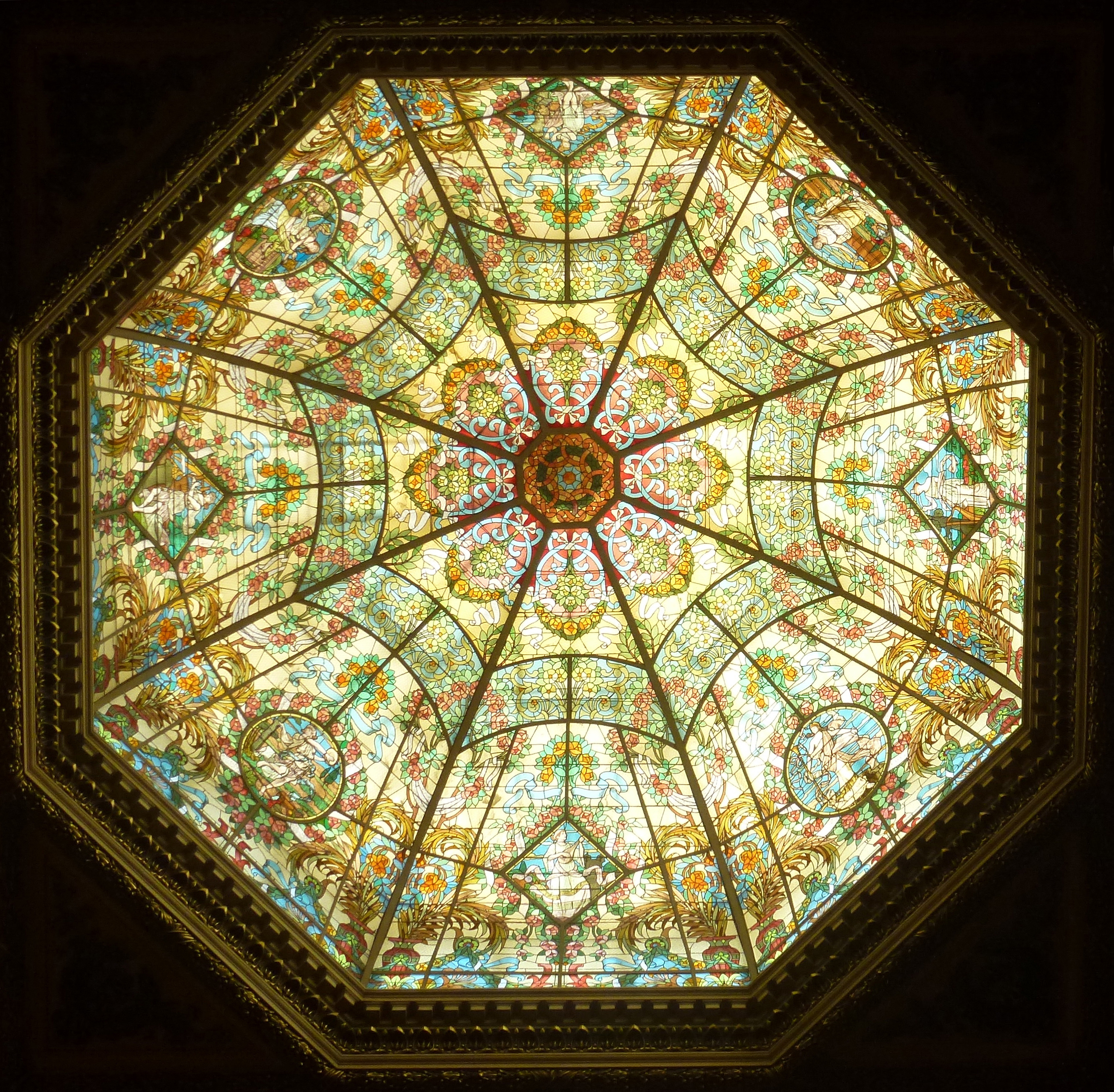 Detalle de la cúpula del Teatro Colón, Buenos Aires.